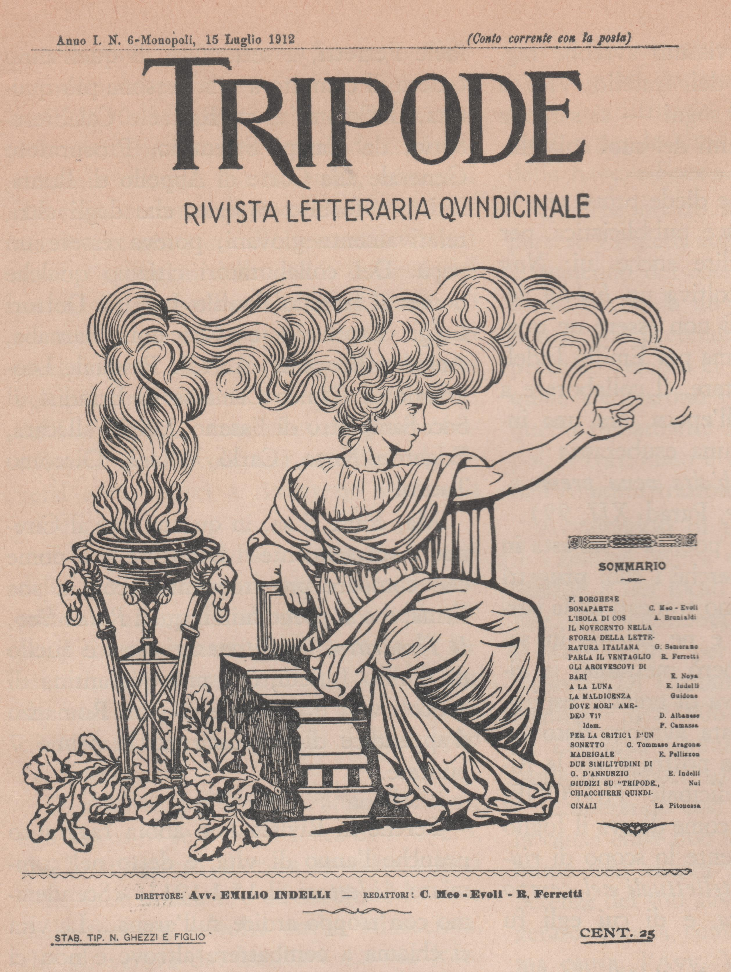 Frontespizio della rivista quindicinale "Tripode", anno I, n.6, del 15/07/1912 stampata a Monopoli, (Bari)